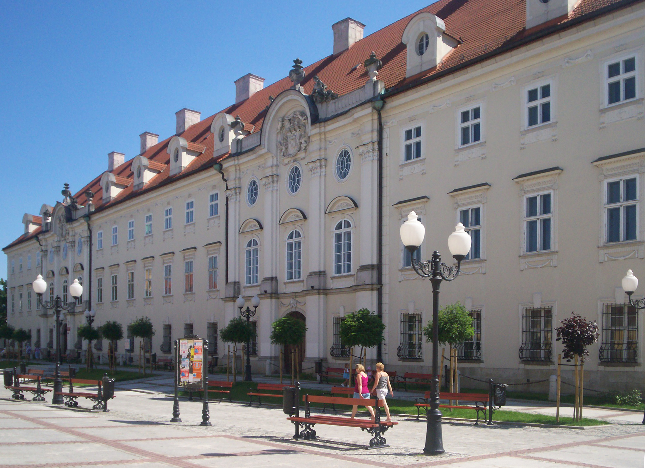 Cieplice Śląskie-Zdrój, dawny pałac Schaffgotschów, obecnie siedziba filii Politechniki Wrocławskiej.